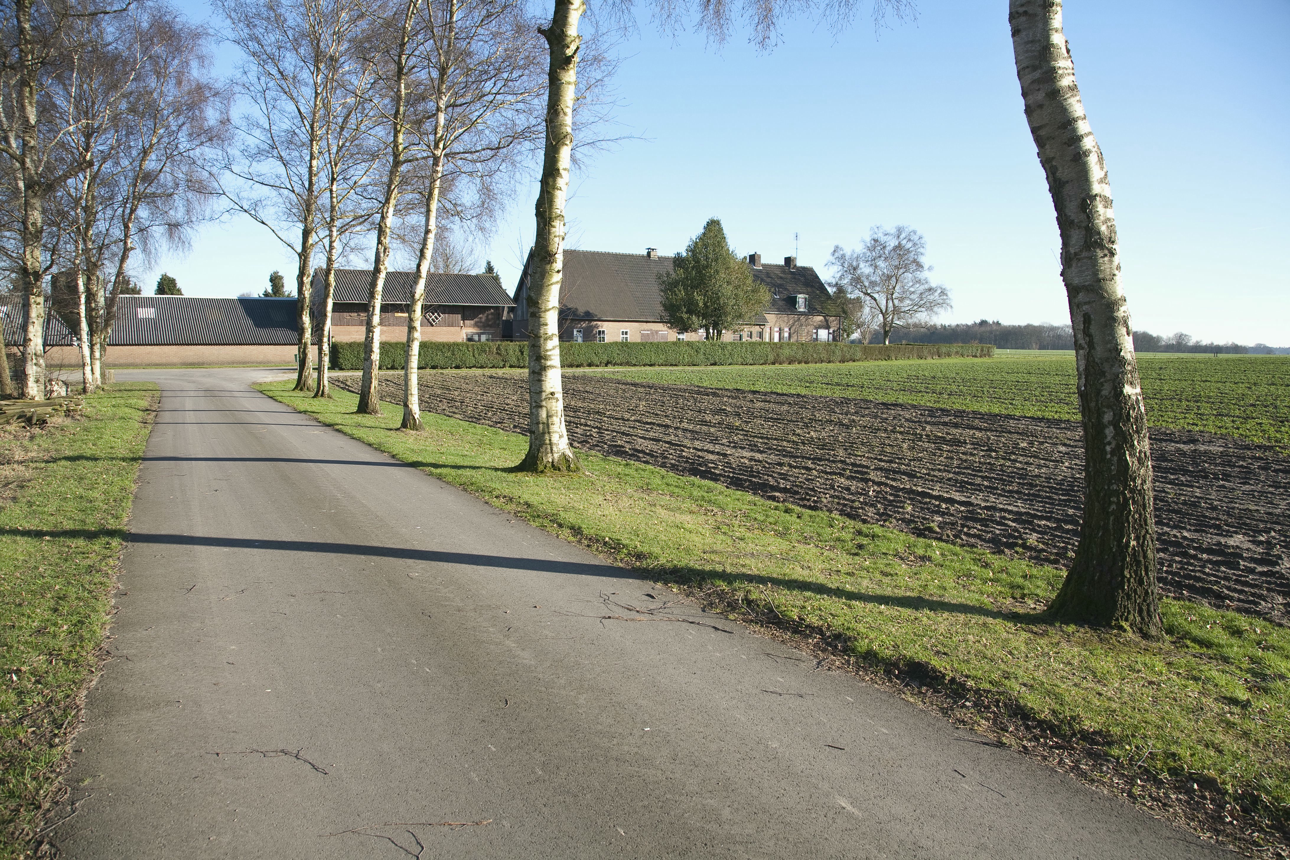 Erf Reterink: Sallands dekzandlandschap. Middeleeuwse erven in de omgeving van Colmschate (opmerking: Publicatie: Mens en land in het hart van Salland (Landschapsbiografie Oost-Nederland))